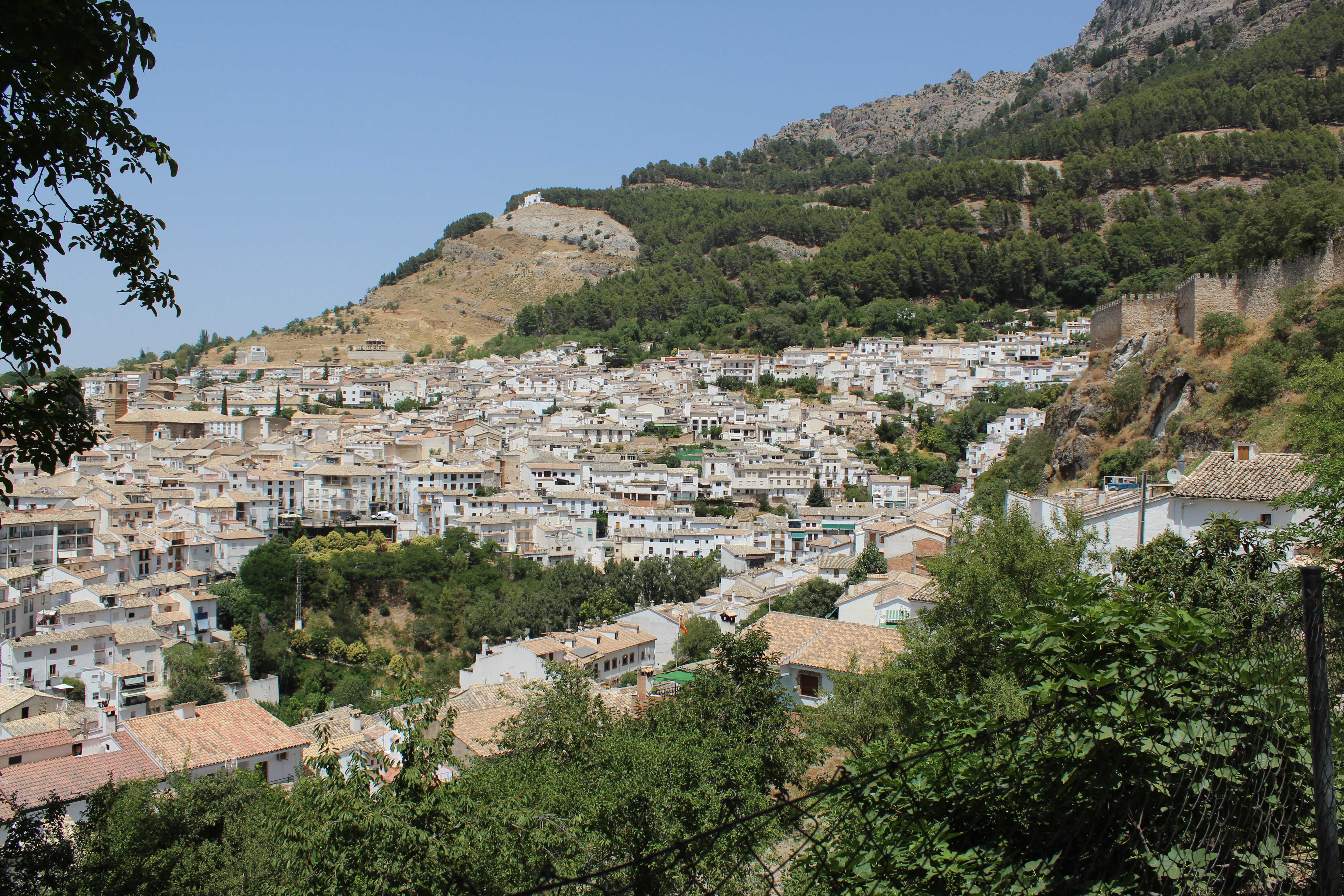 Vista general desde el oeste del municipio de Cazorla.